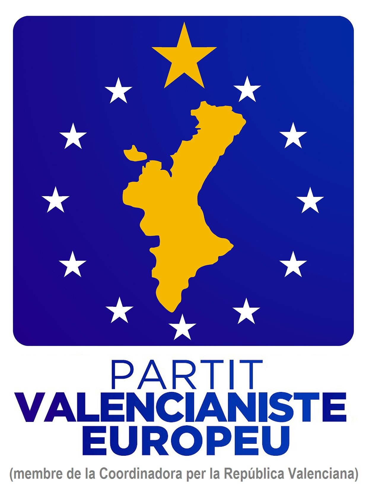 Partit Valencianiste Europeu